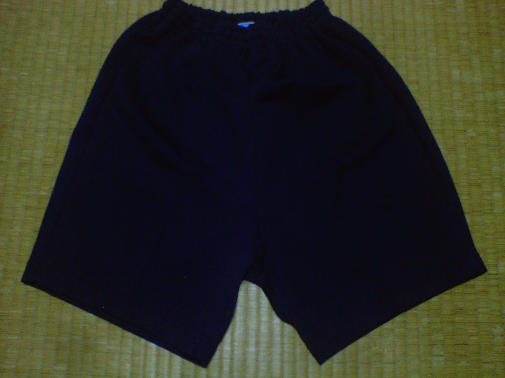 可児市立中部中学校の女子用紺色ハーフパンツ。